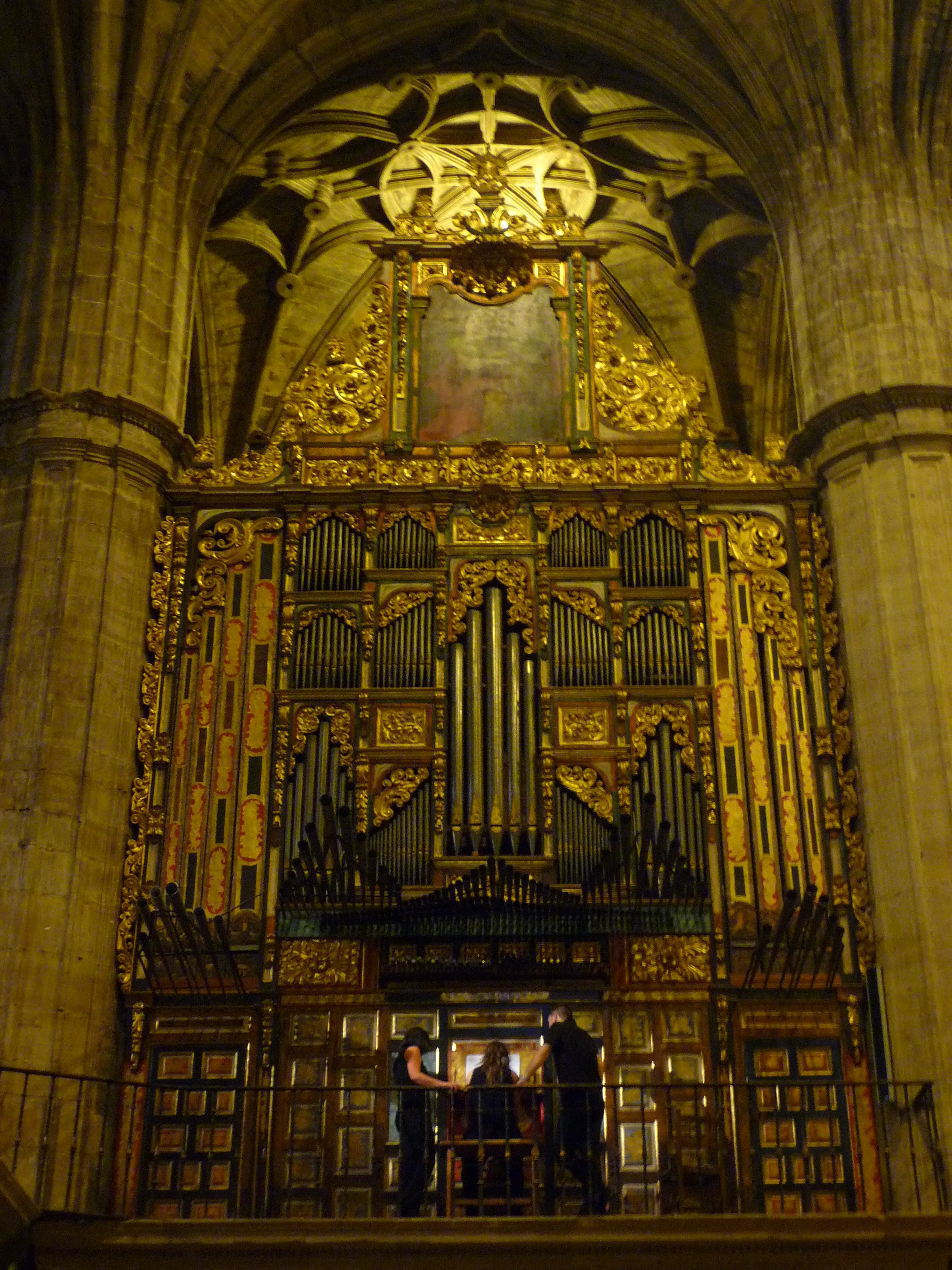 Organo barroco de la Iglesia de Santo Tomás de Haro, La Rioja (España). Tomada durante el concierto de la organista Ana Belén García de San Sebastián.